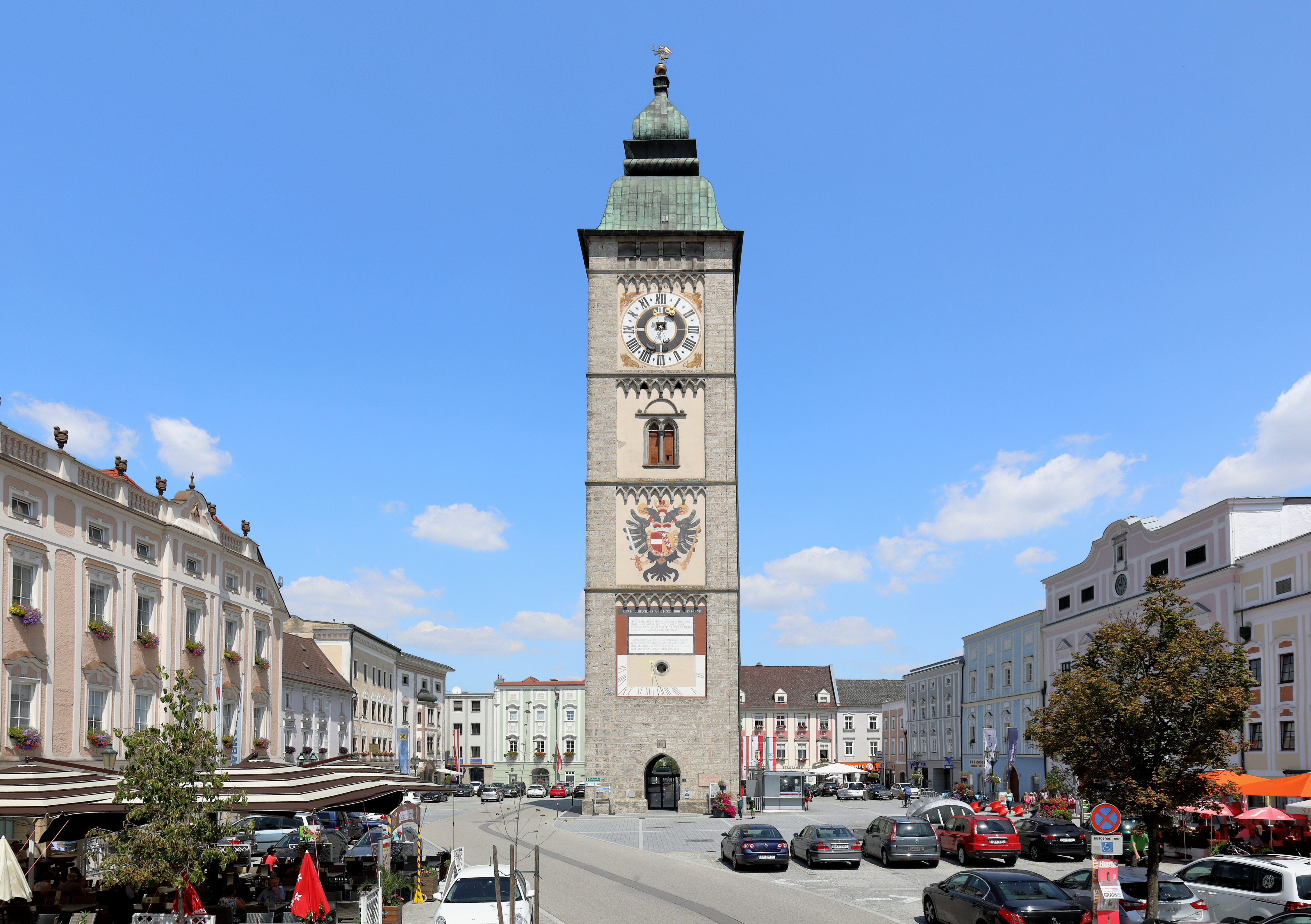 Die Südansicht des Hauptplatzes der oberösterreichischen Stadt Enns mit dem insgesamt rd. 60 m hohen und von 1564 bis 1568 errichteten Stadtturm im Zentrum.